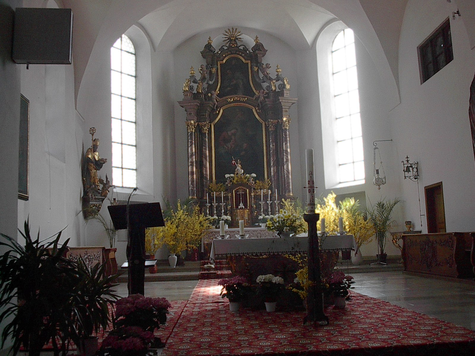 Der Altarraum der Kirche St. Augustin in Neuburg-Donau